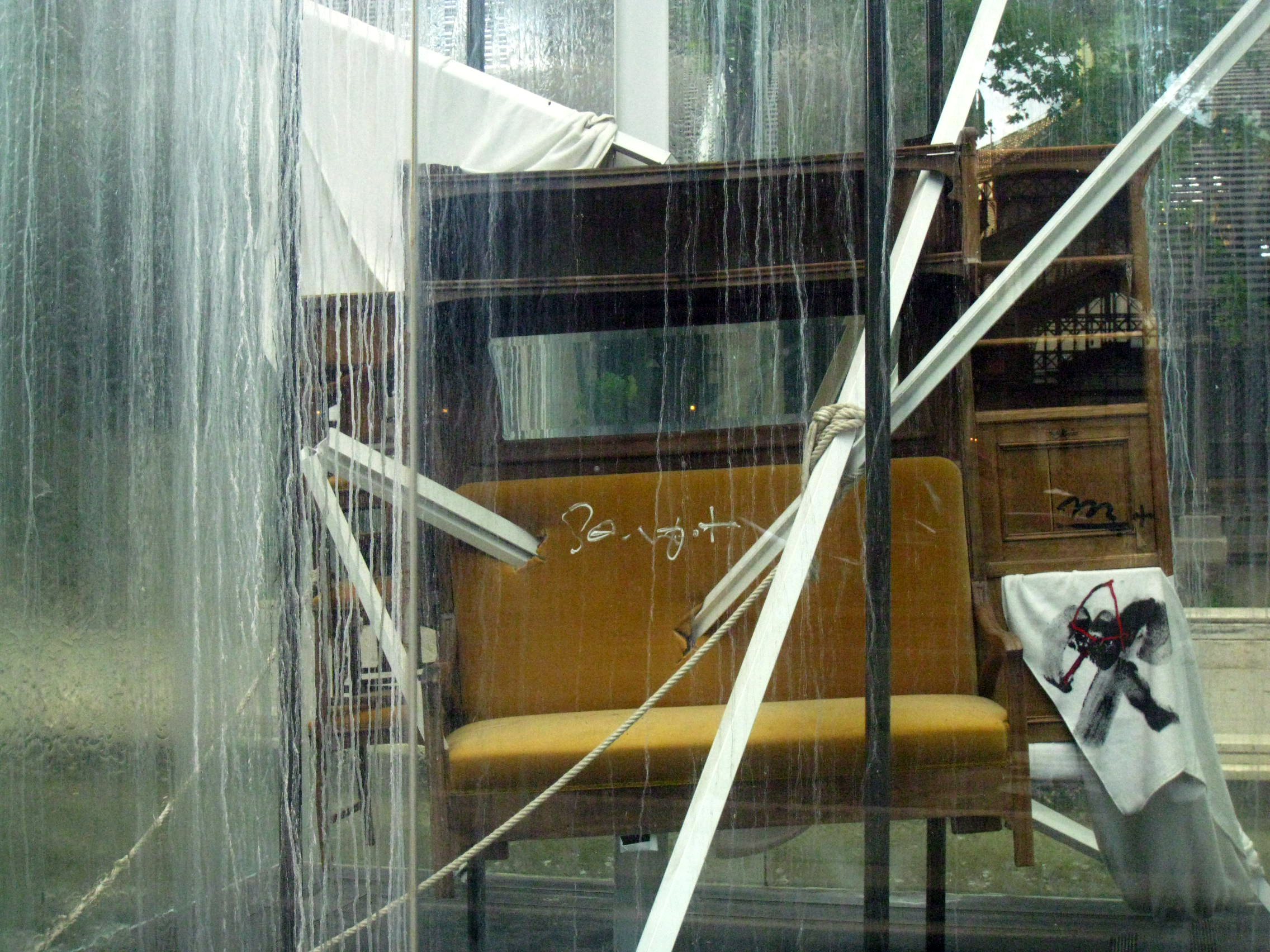 Homenatge a Picasso (Antoni Tàpies). Pg. Picasso (Barcelona)